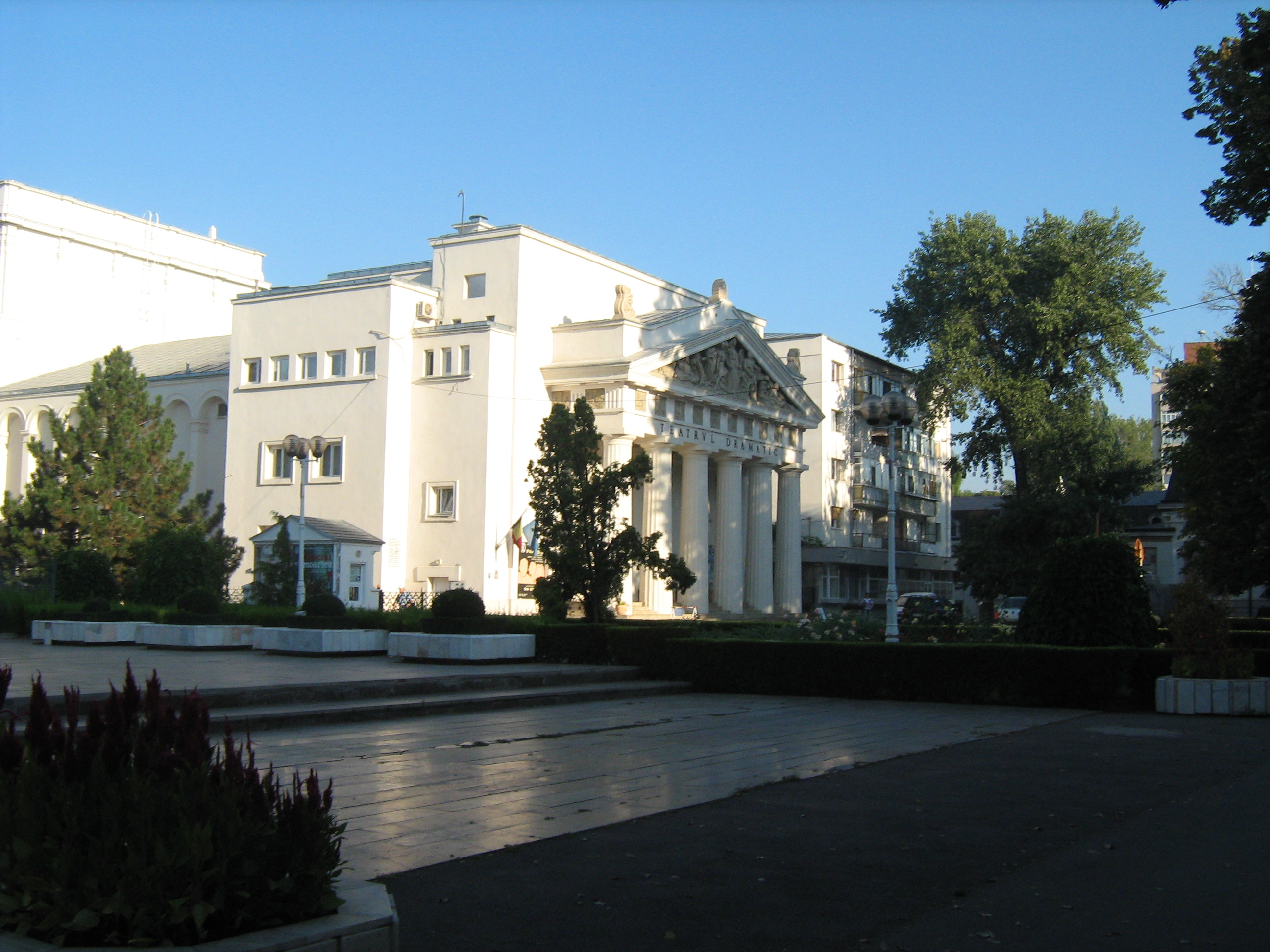 Galaţi, Societatea Culturală V.A.Urechia, azi Teatrul Dramatic